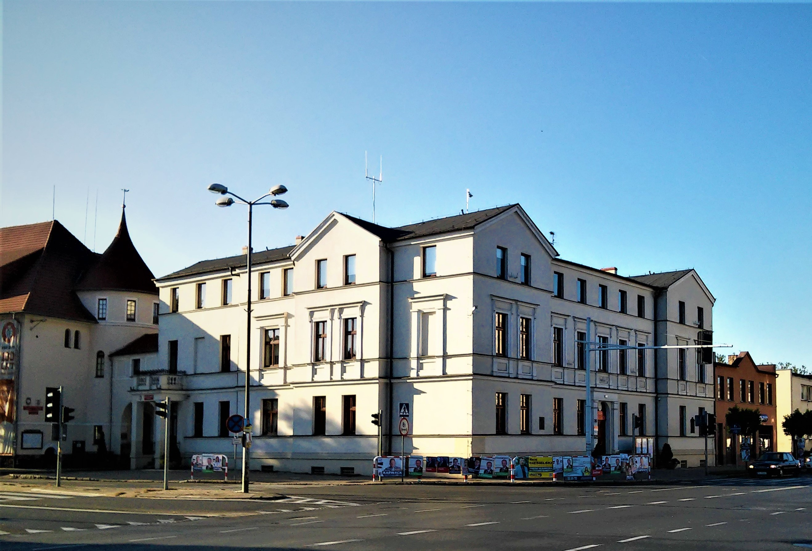 Urząd Miasta i Gminy w Szamotułach